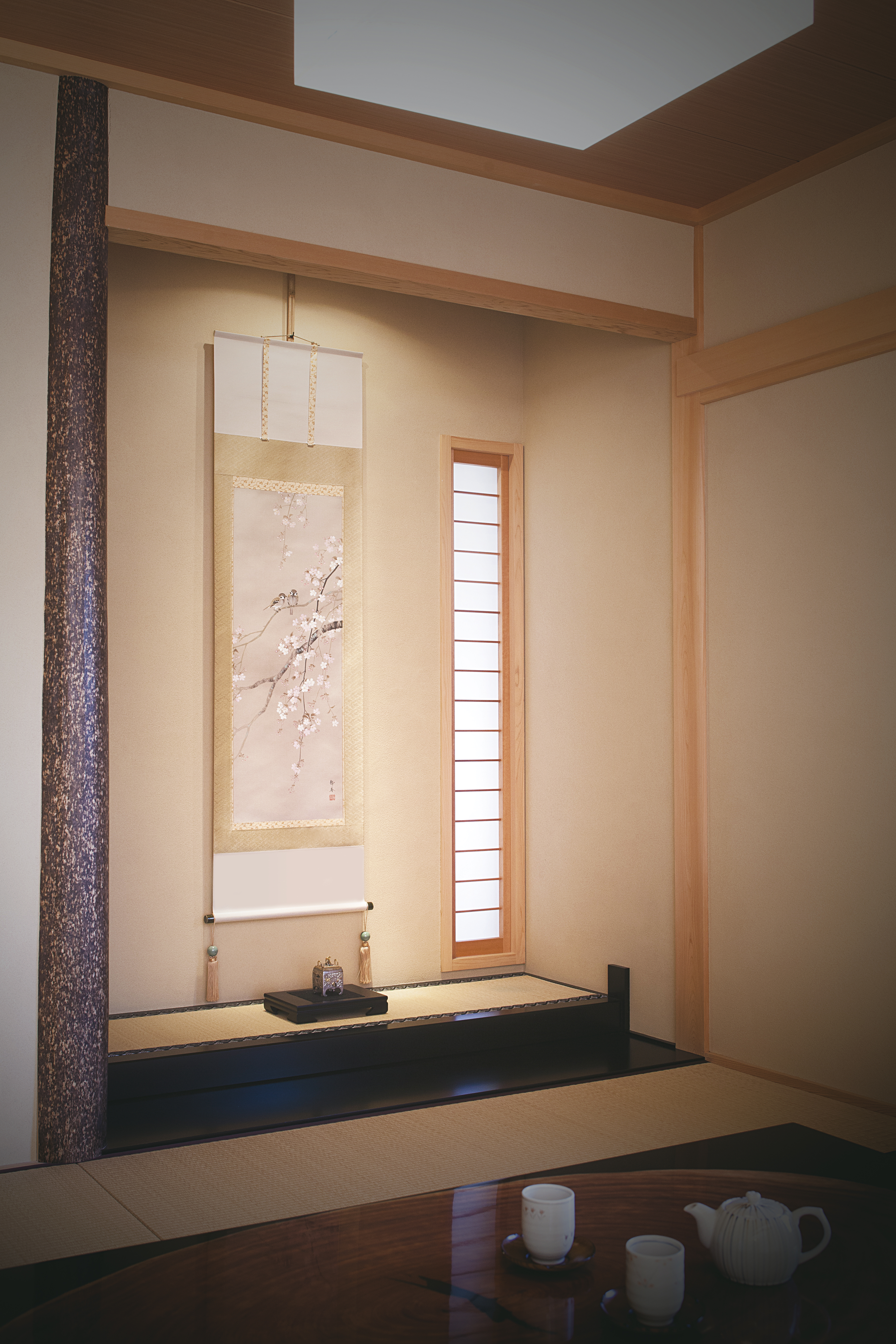 春の掛軸 北条静香 - 桜に小禽